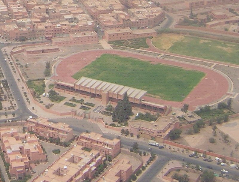 Sidi Youssef Ben Ali Stadium